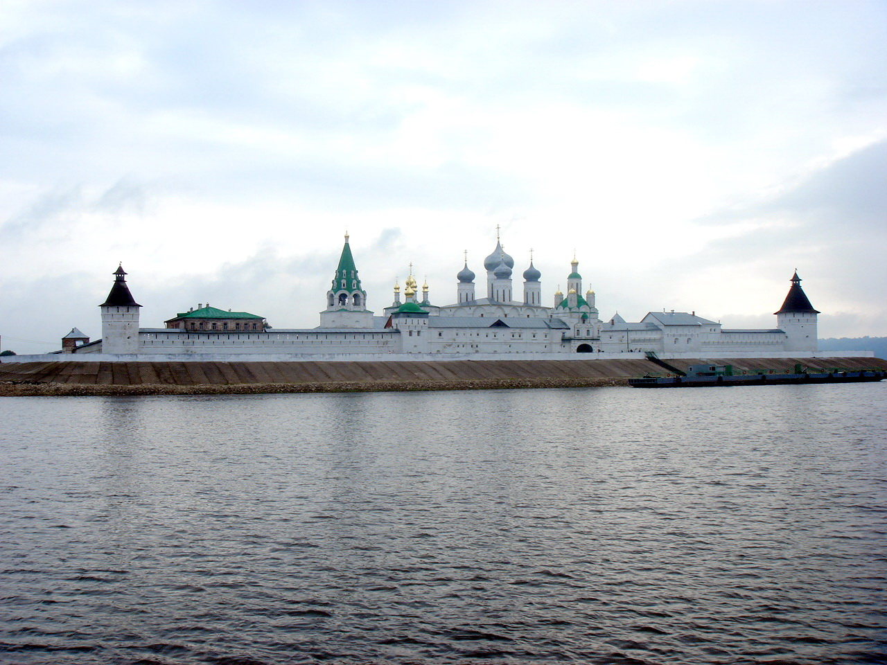 Ансамбль Макарьевского Желтоводского монастыря на Волге (Нижегородская область, Лысково, рп Макарьево)